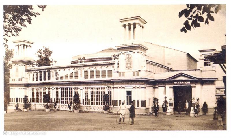 Театр "Антей" в саду "Эрмитаж" на Божедомке (арх. Ф. Шехтель, 1886 г.)